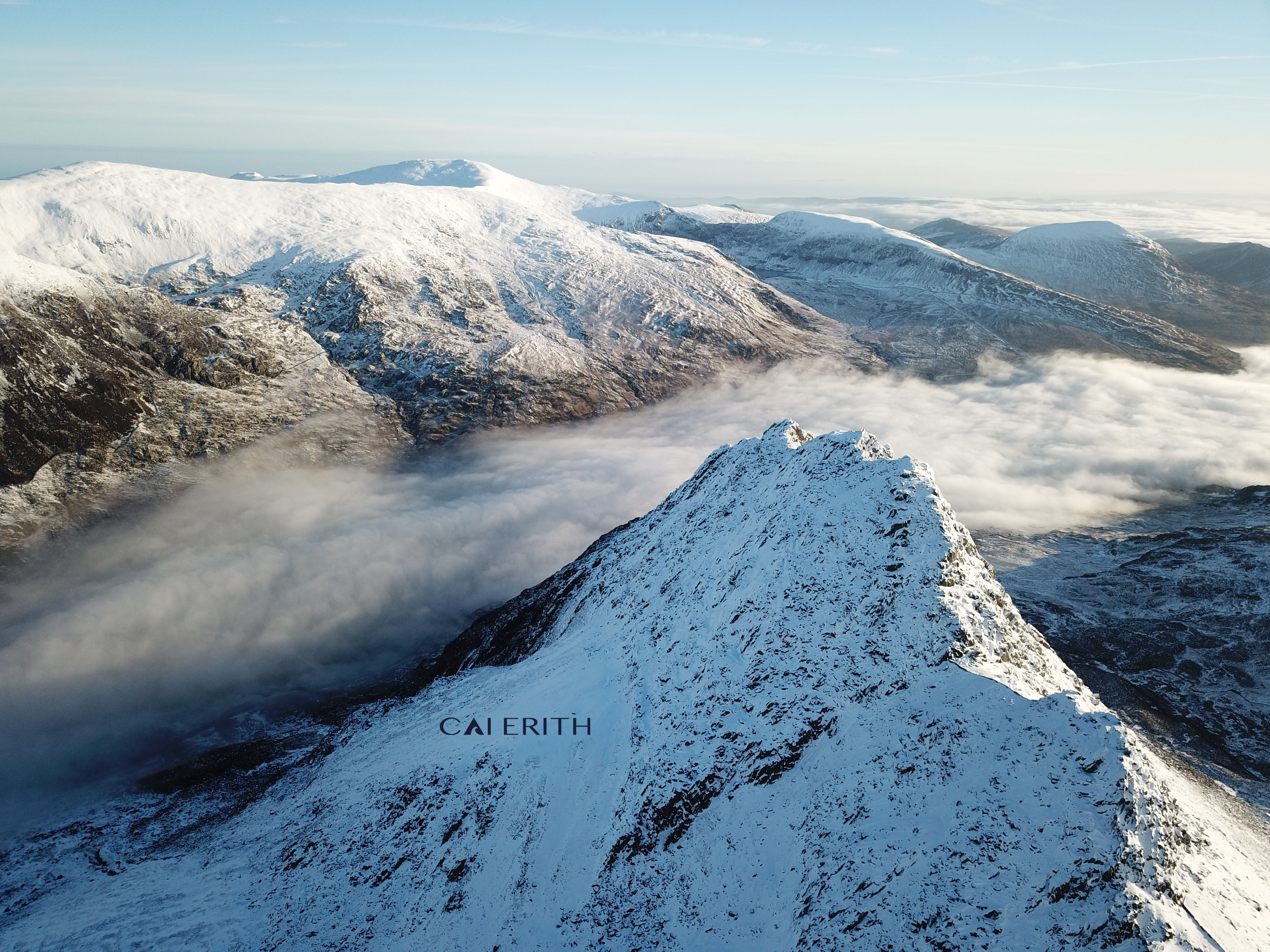 Cymylau Ogwen a Thryfan